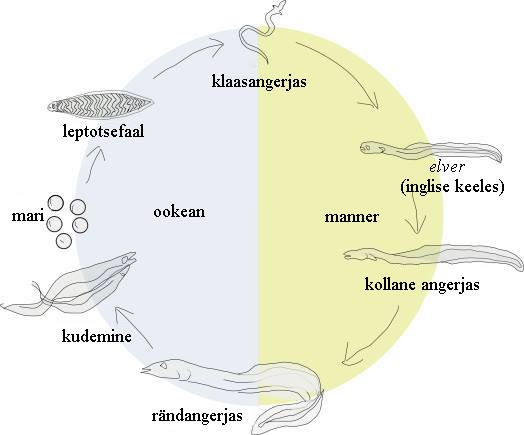 Euroopa angerja elutsükkel